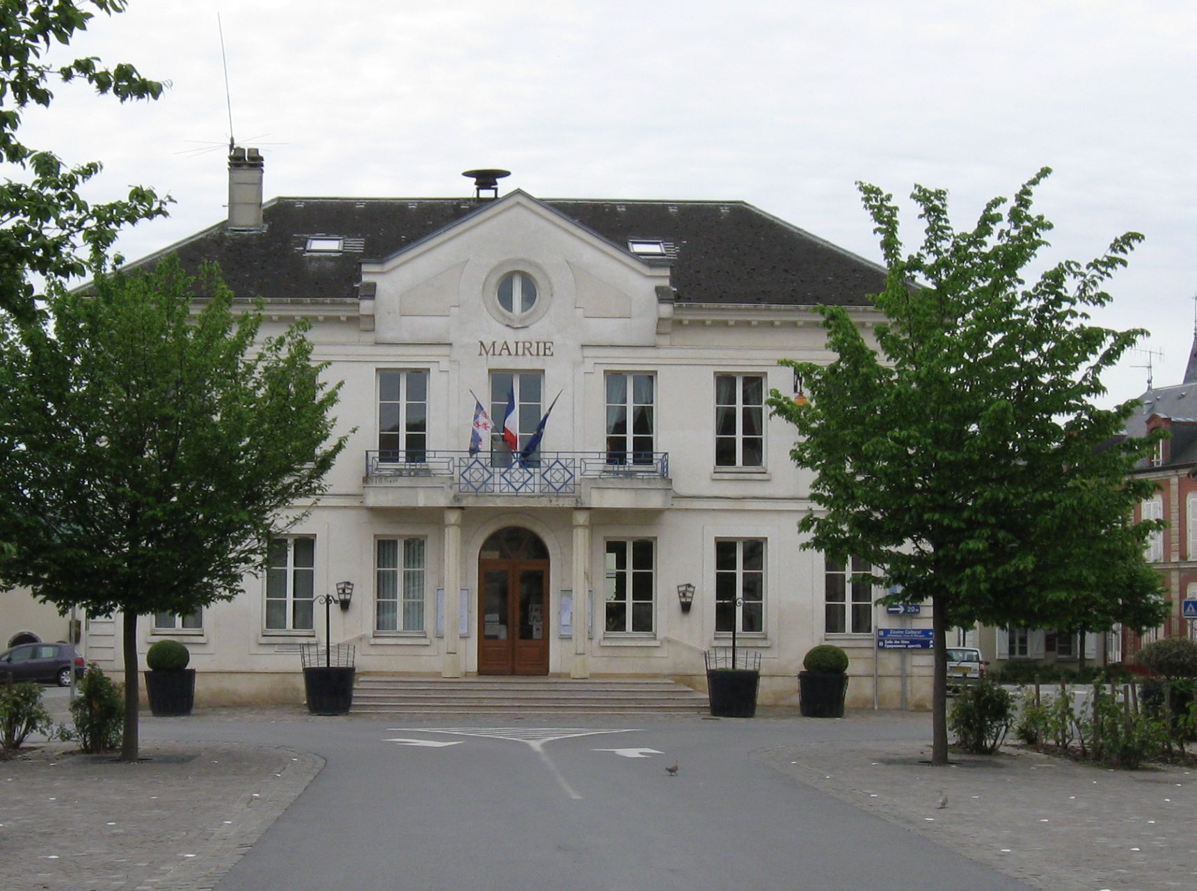 La mairie-école de Charly-sur-Marne (Aisne , région Picardie)